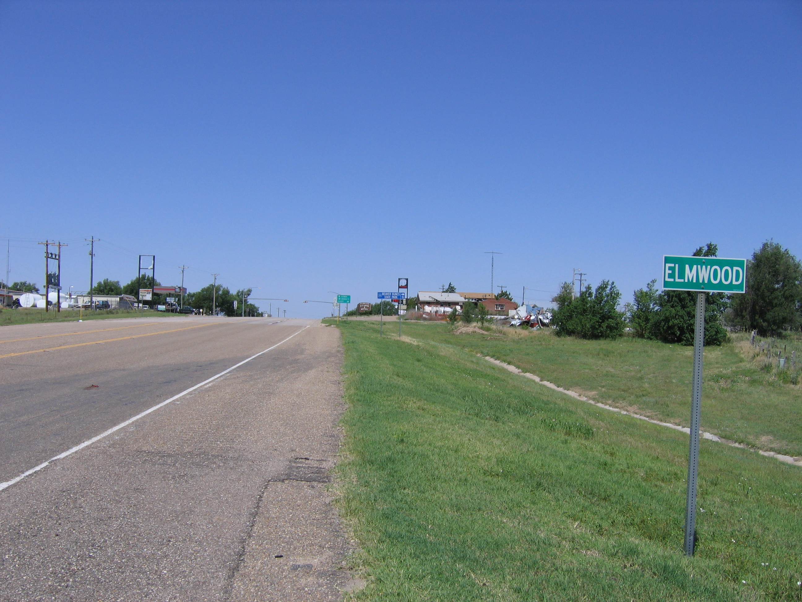 Elmwood, Oklahoma